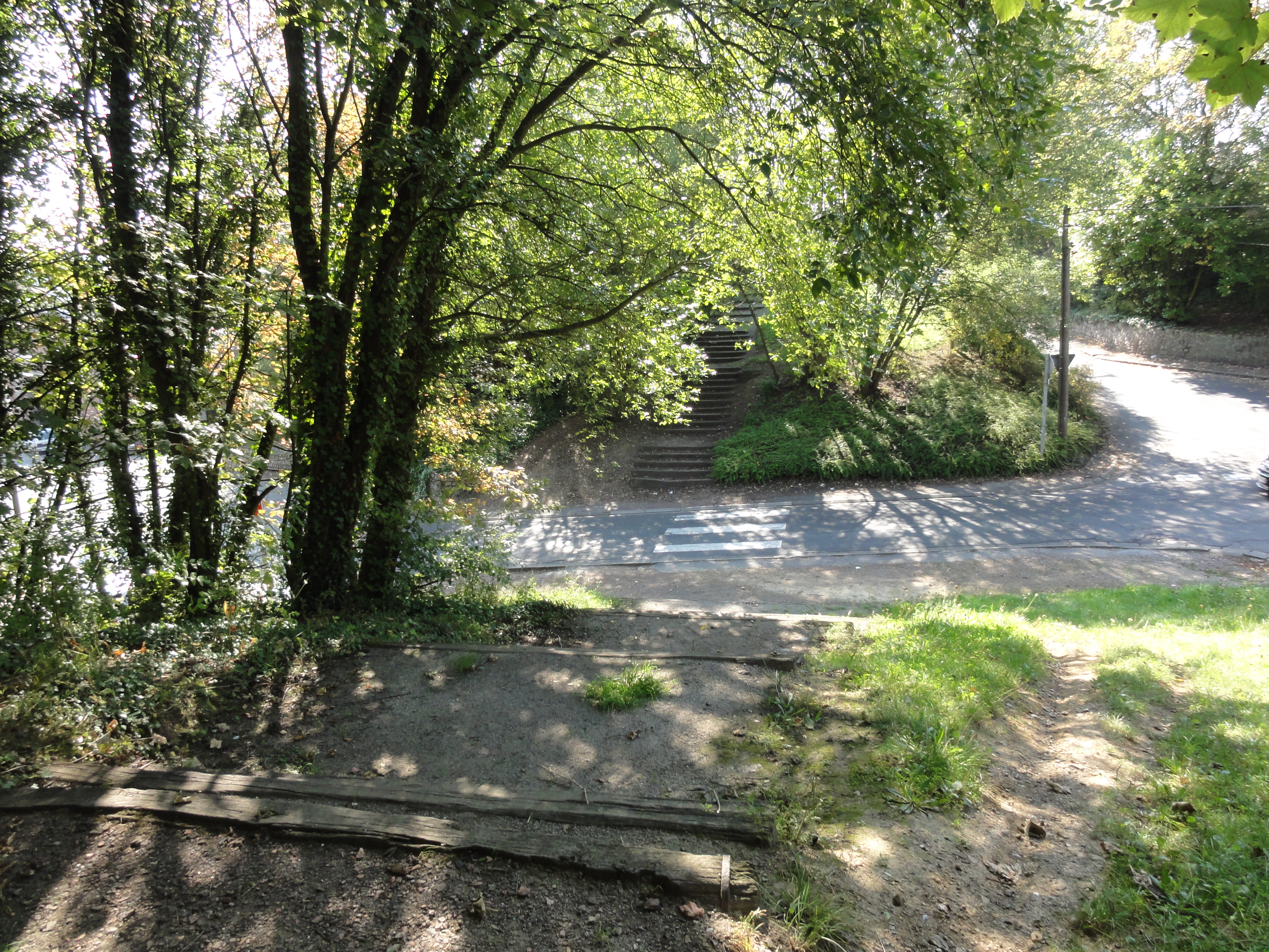 Terril n° 241 dit Cavalier de la voie du 3, fosse n° 3 - 3 bis - 3 ter de la Compagnie des mines de Bruay dans le bassin minier du Nord-Pas-de-Calais, Bruay-la-Buissière, Pas-de-Calais, Nord-Pas-de-Calais, France.